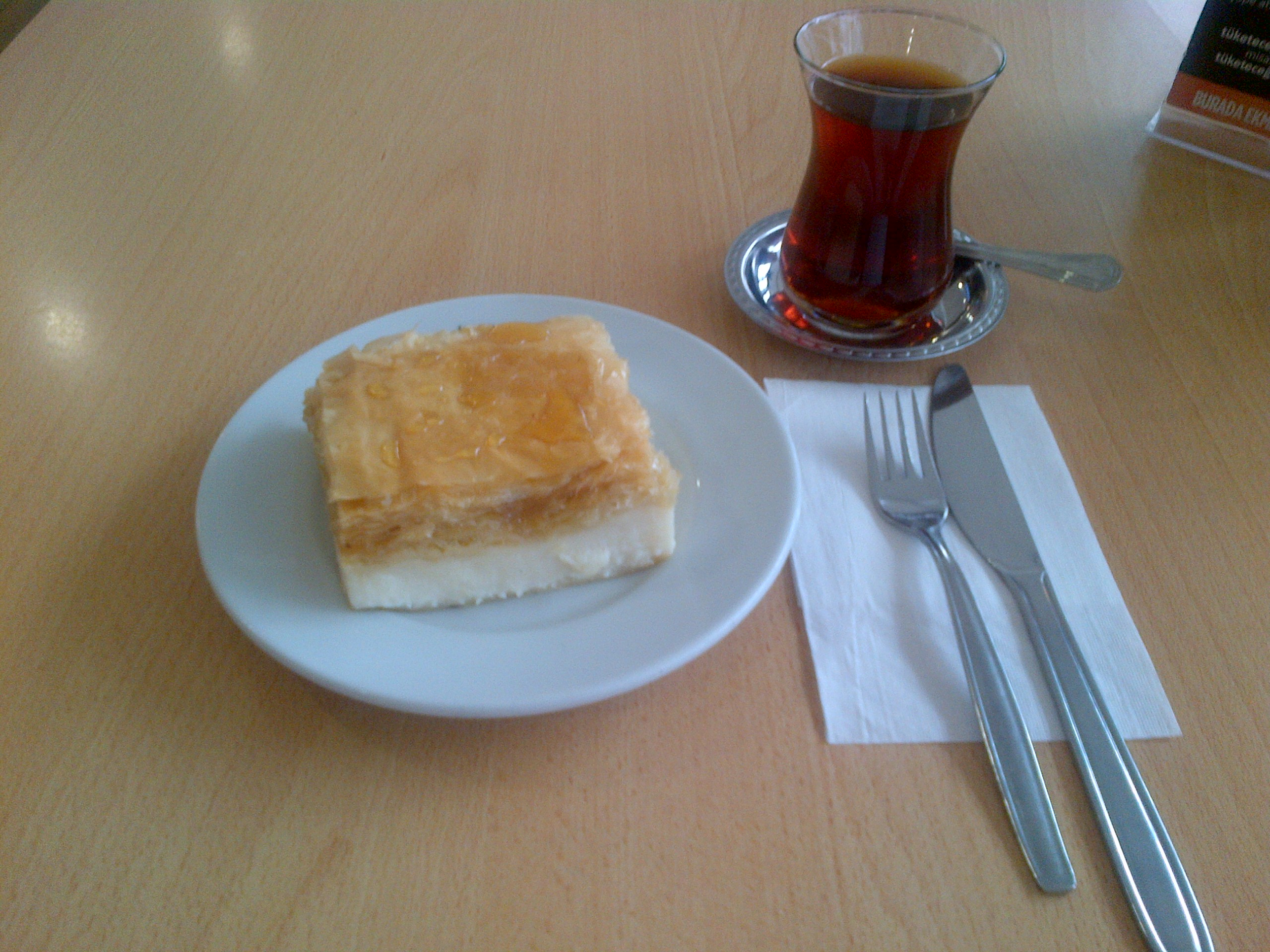 Una porcion de laz böreği con un vaso de té turco.